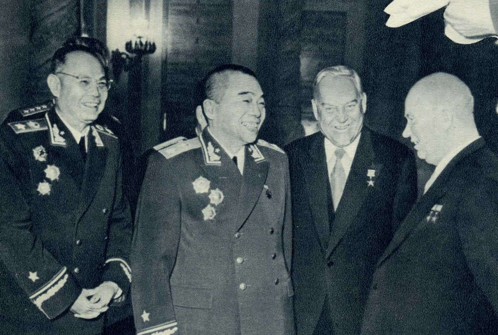 Peng Dehuai, Ye Jianying, Nikolai Bulganin, and Nikita Khrushchev